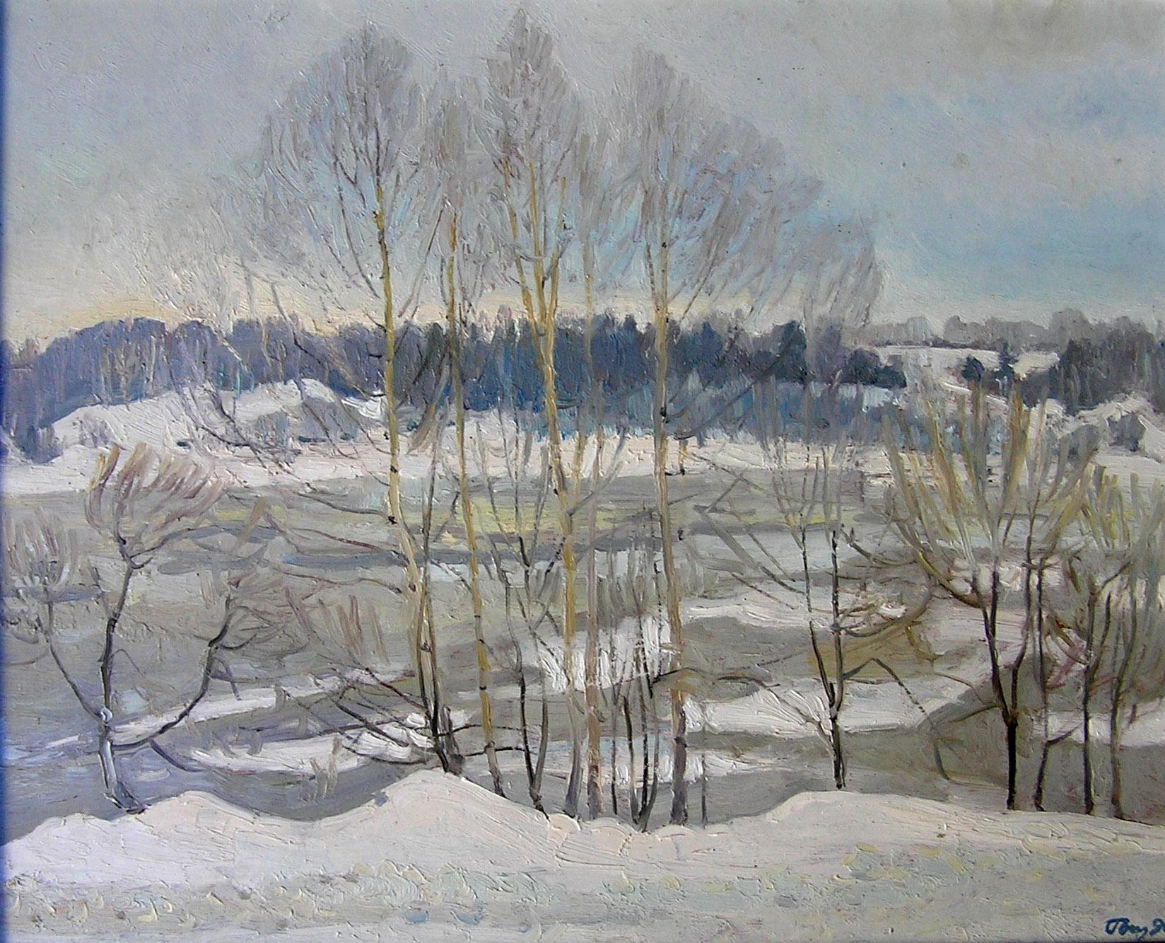 Ледоход на Волге, 1990.